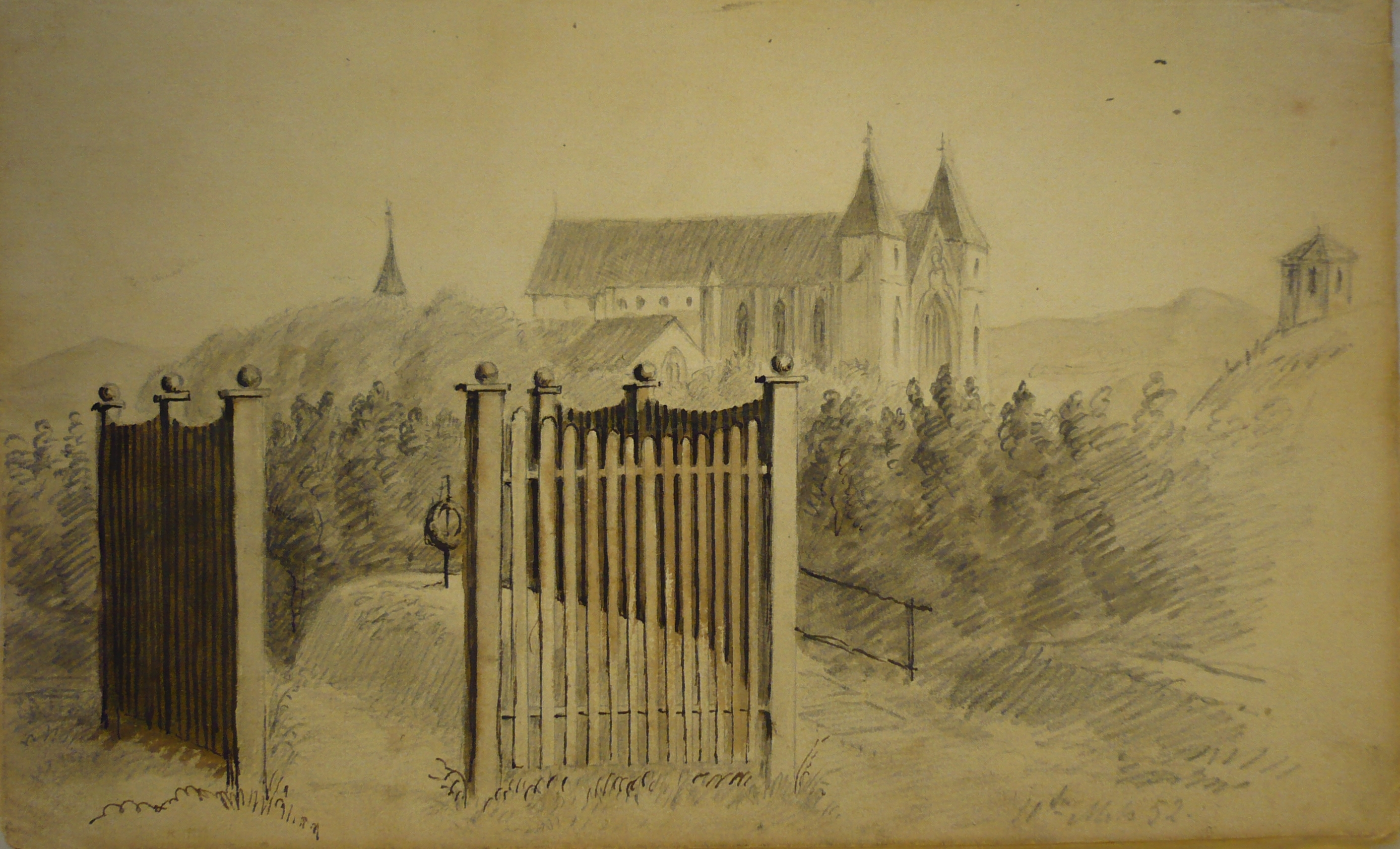 Berhard Hansons skisse fra Egenes kirkegård fra 1852. Originalen er i Berhard Hansons skissebok i Stavanger Museum.